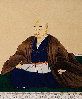 池田治政（第9代岡山城主）、Ikeda Harumasa(the 9th Okayama castellan)